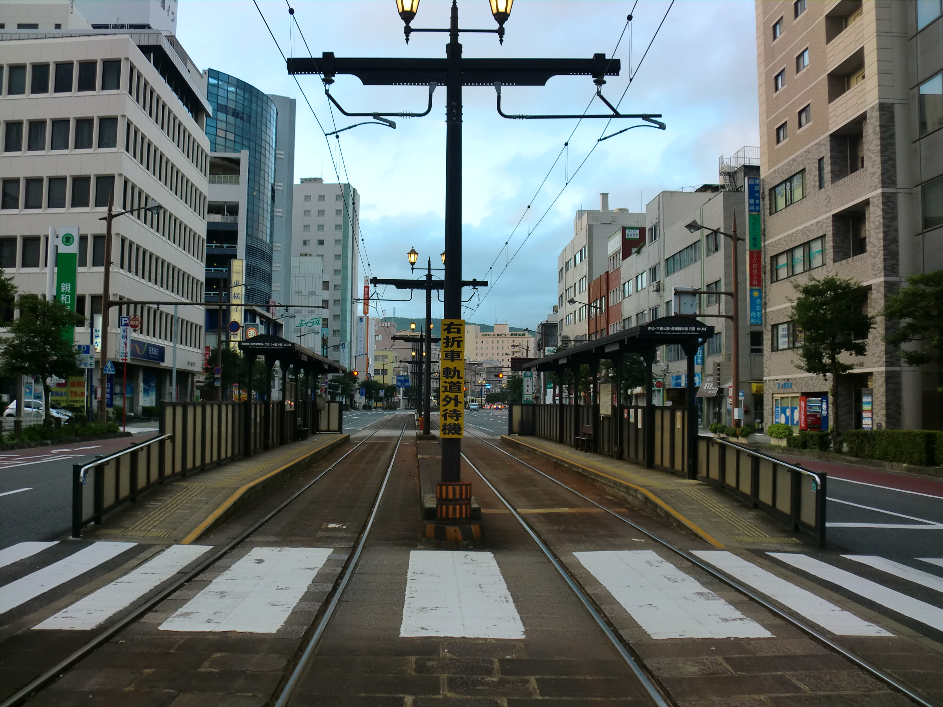 長崎電気軌道五島町駅